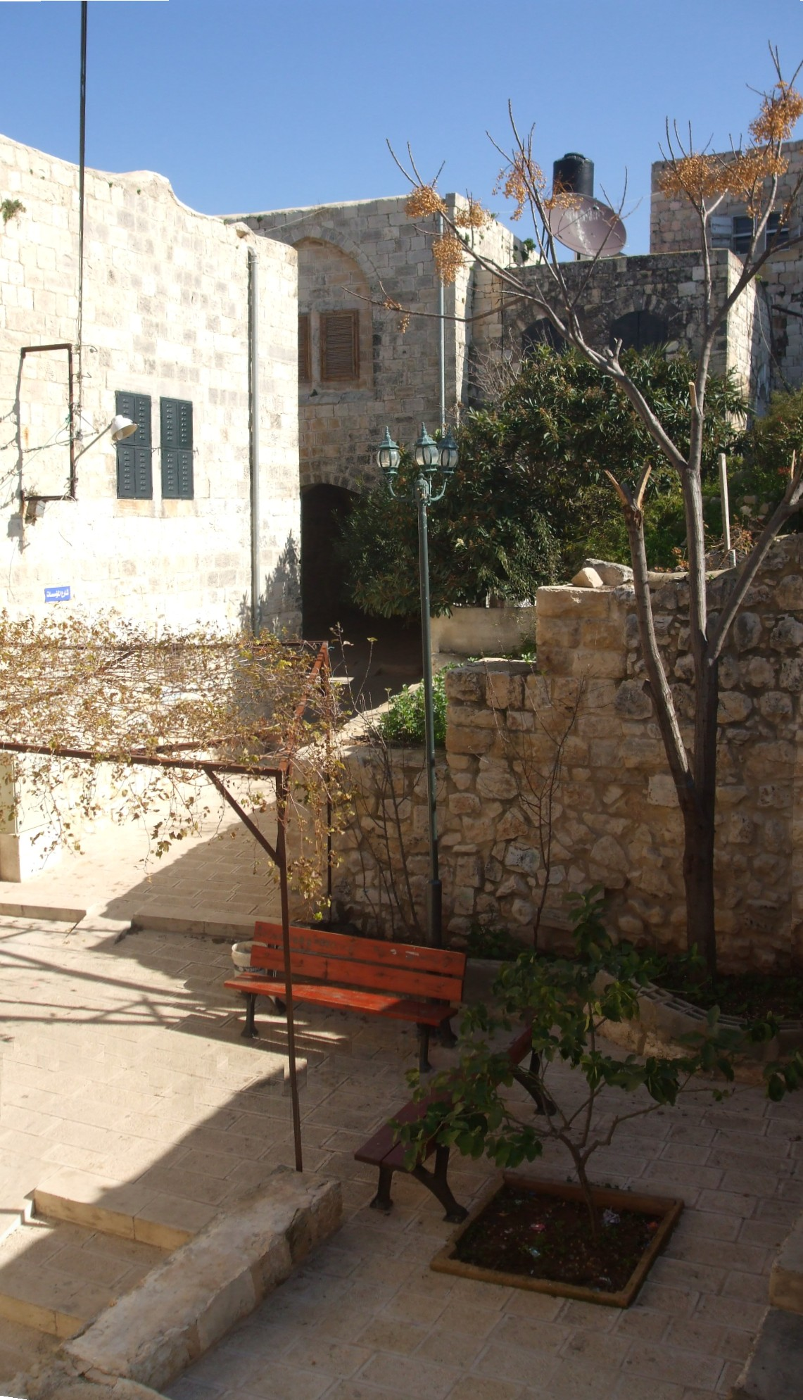 البلدة القديمة